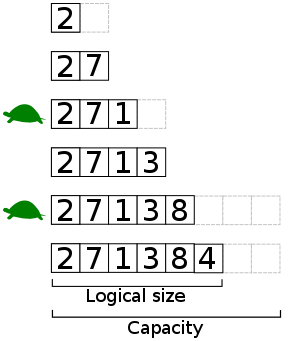 Няколко стойности се добавят в края на динамичен масив с геометрична експанзия. Сивите клетки показват, запазено място за експанзия. Повечето вмъквания са бързи (константно време), а някои са бавни, поради необходимостта от преразпределение (Θ (п) път, белязан с костенурки). Логическият размера и качеството на крайния масив са показани.